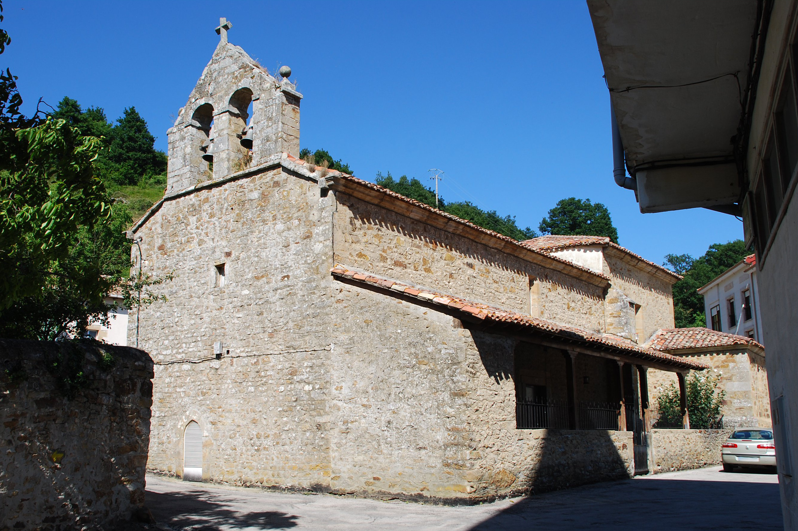 Iglesia de San Nicolás en Espinosa de los Monteros, provincia de Burgos (España).